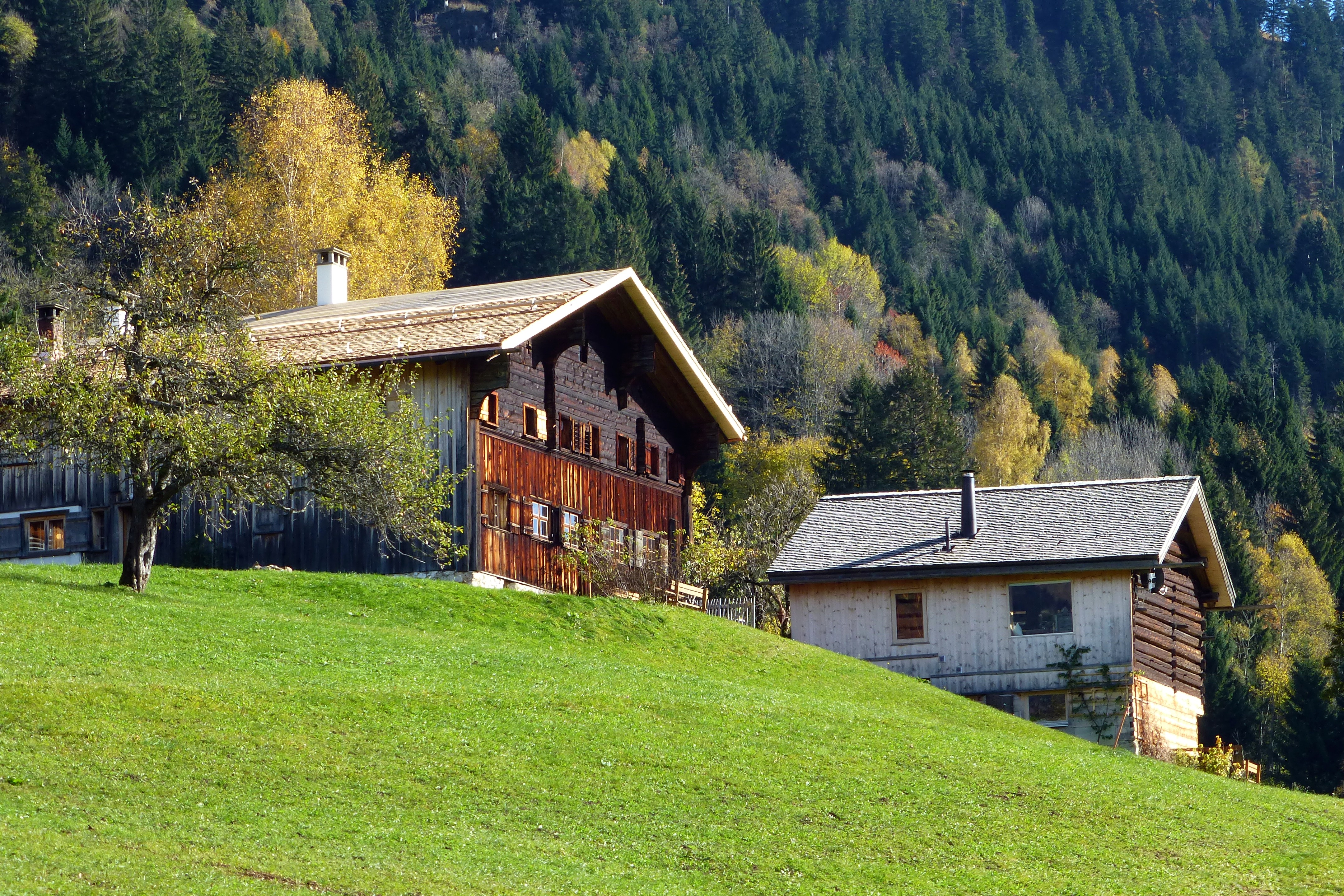 Nordwestansicht des denkmalgeschützten Doppelwohnhauses Ludescherberg 3 in Ludesch